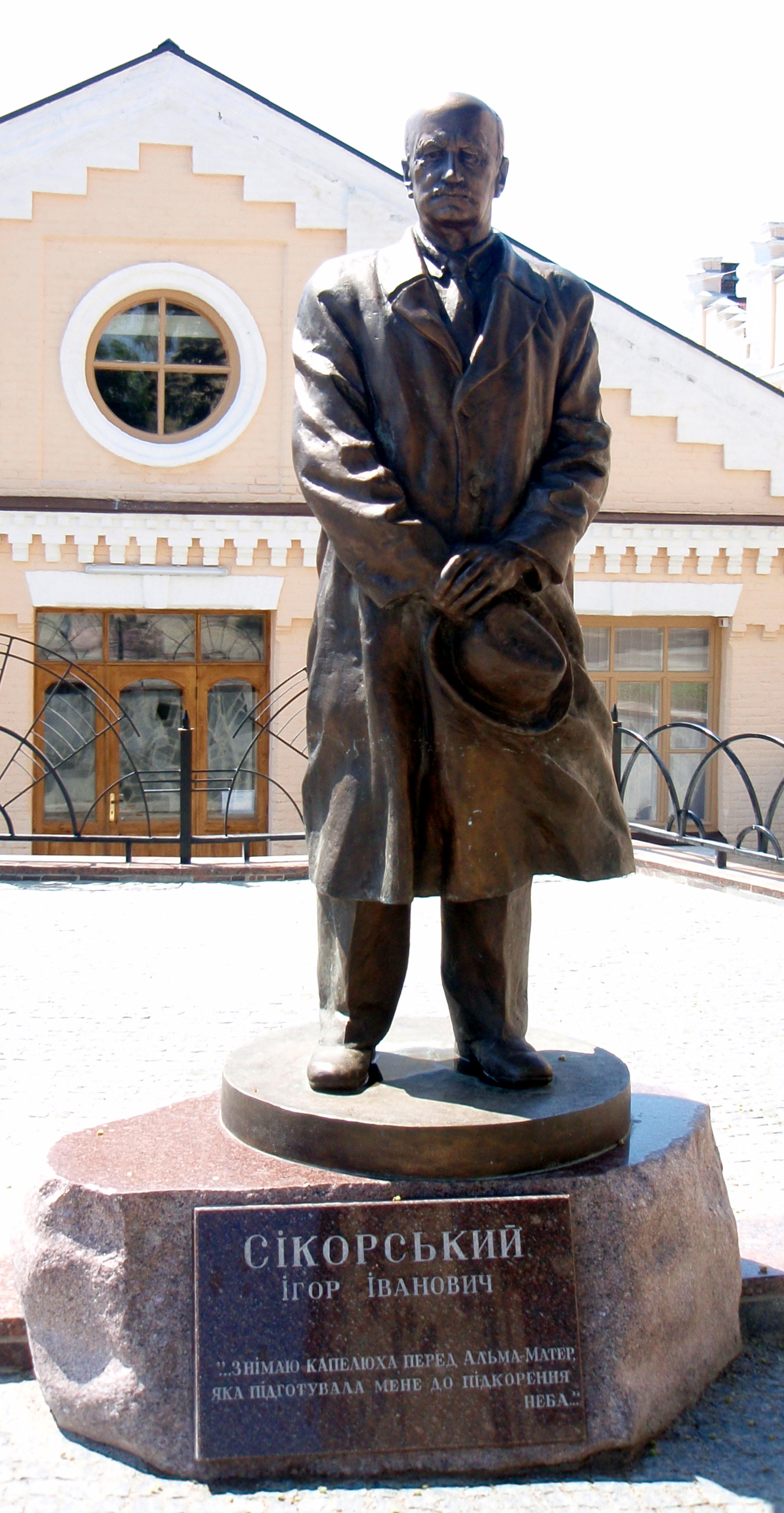 I. Sikorski Denkmal in NTUU KPI. Kiew, Ukraine